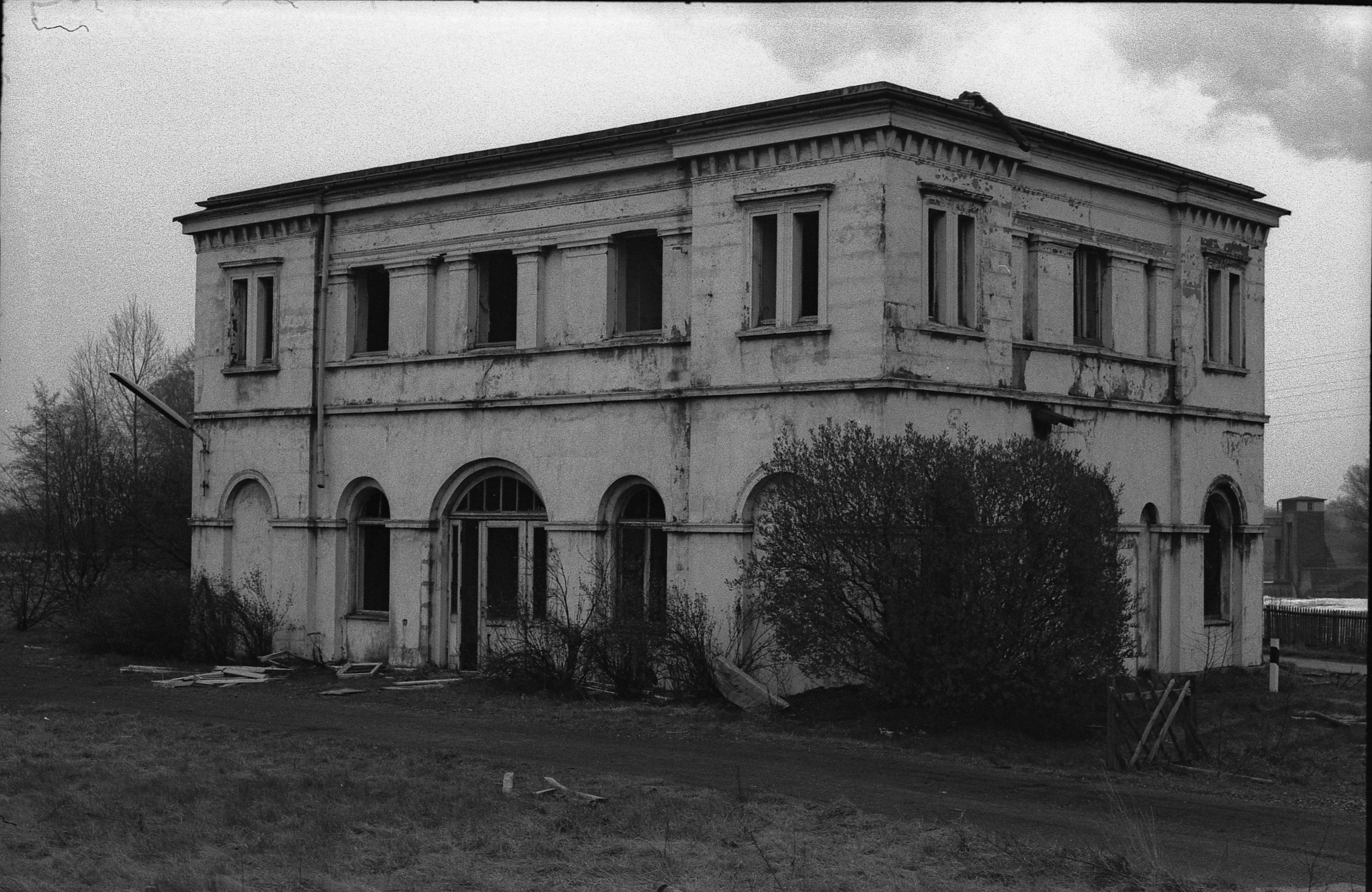 Haus Budenburg östlicher Pavillon